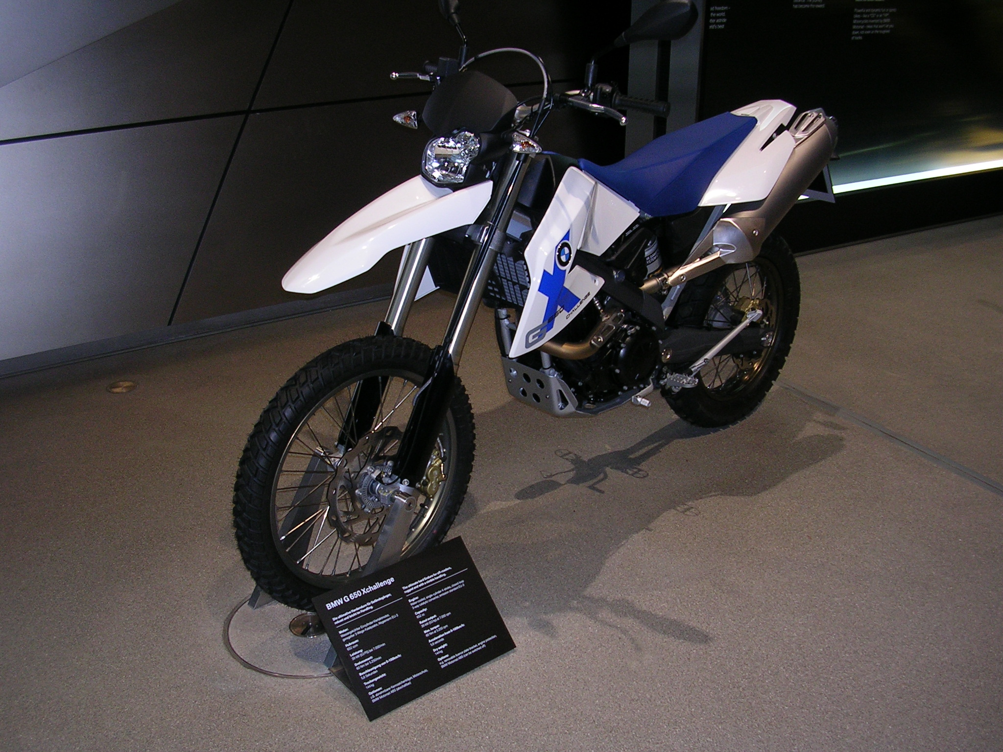 BMW G 650 Xchallenge. BMW Welt, Munich, 2008.